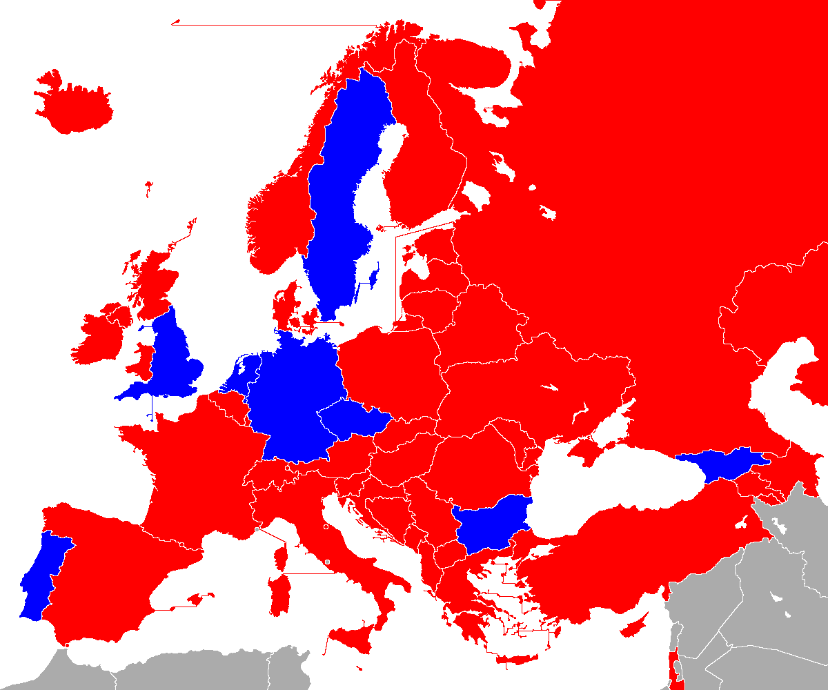 Команды ЕВРО 2017 (до 19 лет)